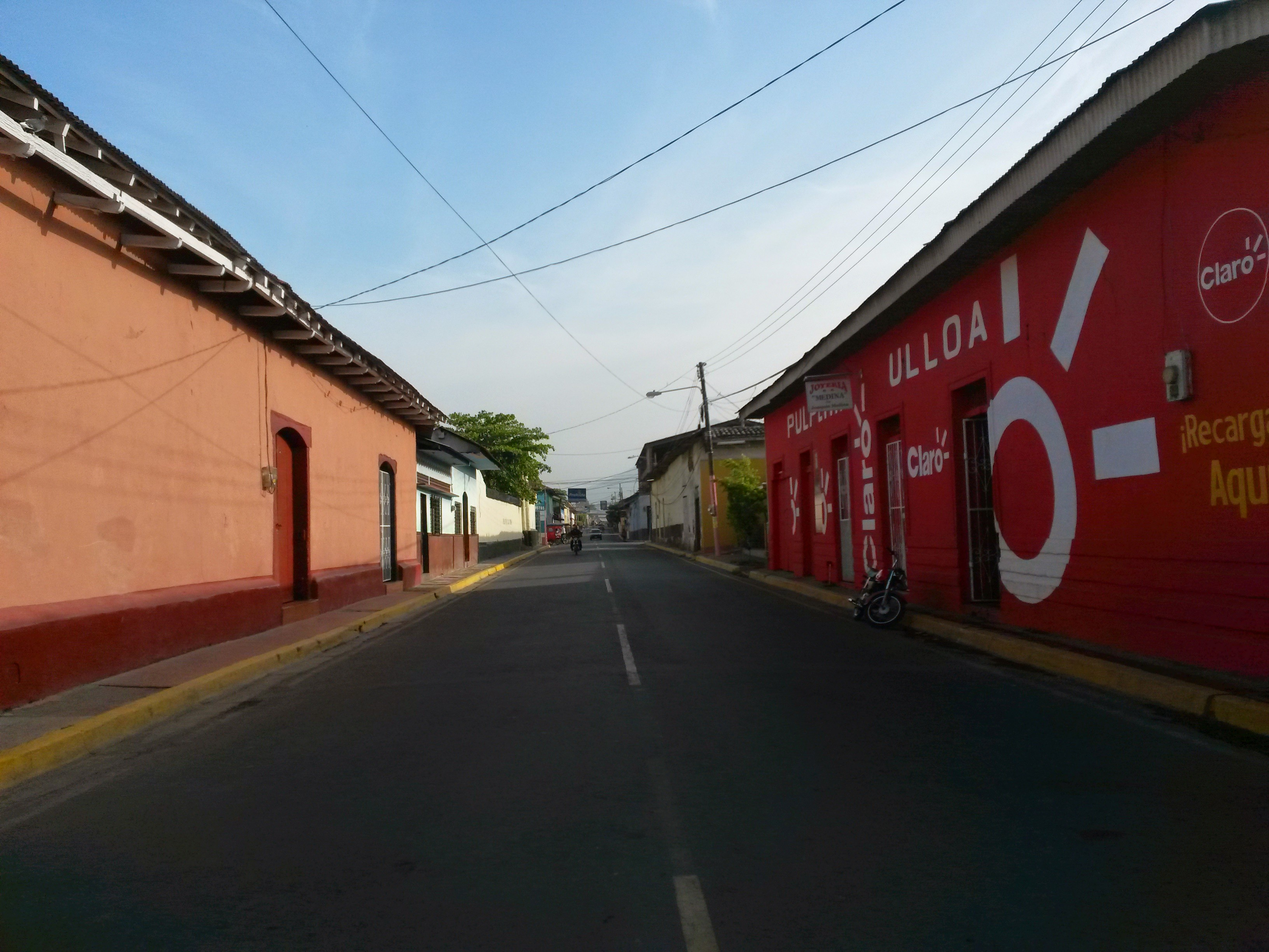 Calle Numero 7 Avenida Central Chichigalpa